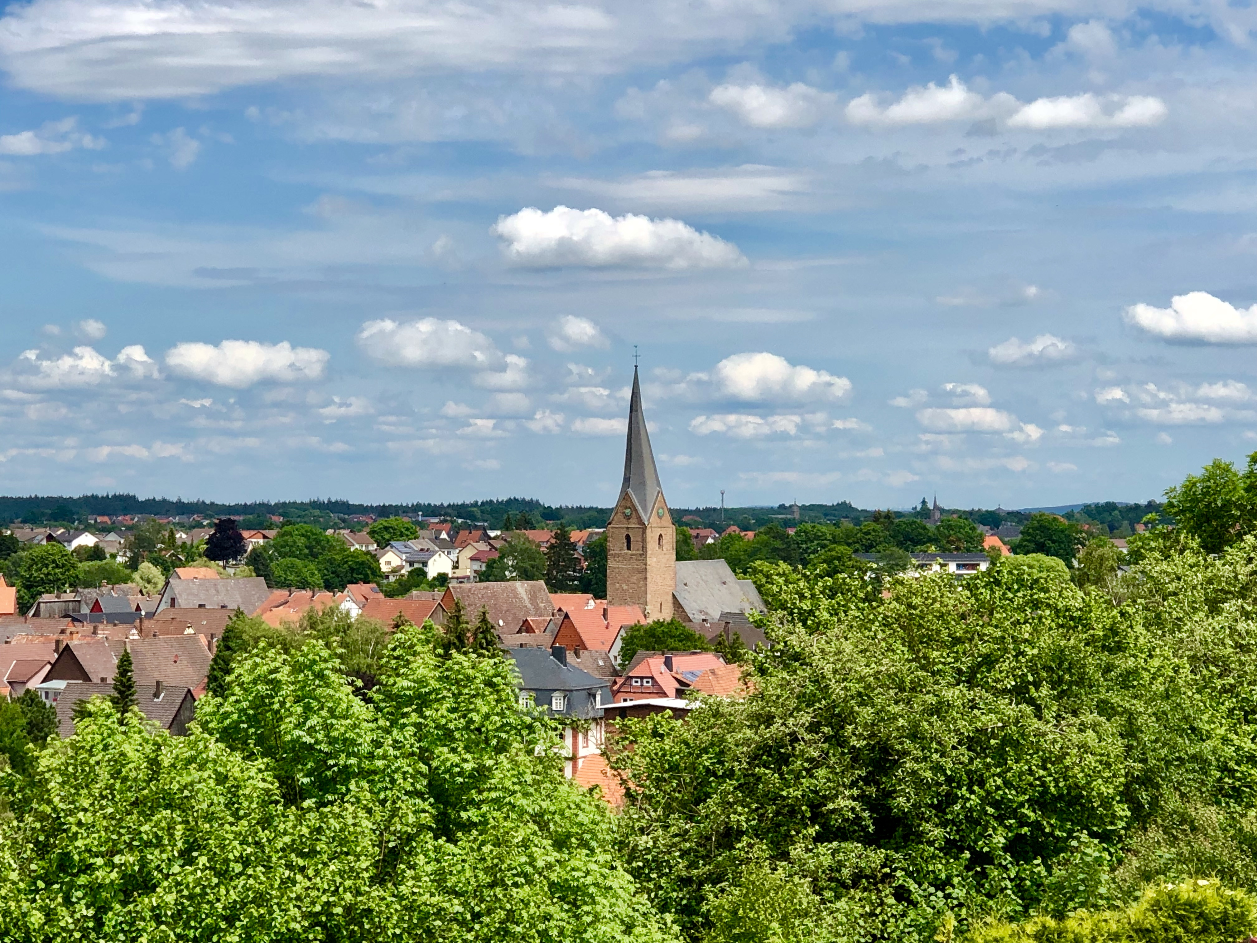 Blick auf die Stadt aus Richtung Warte